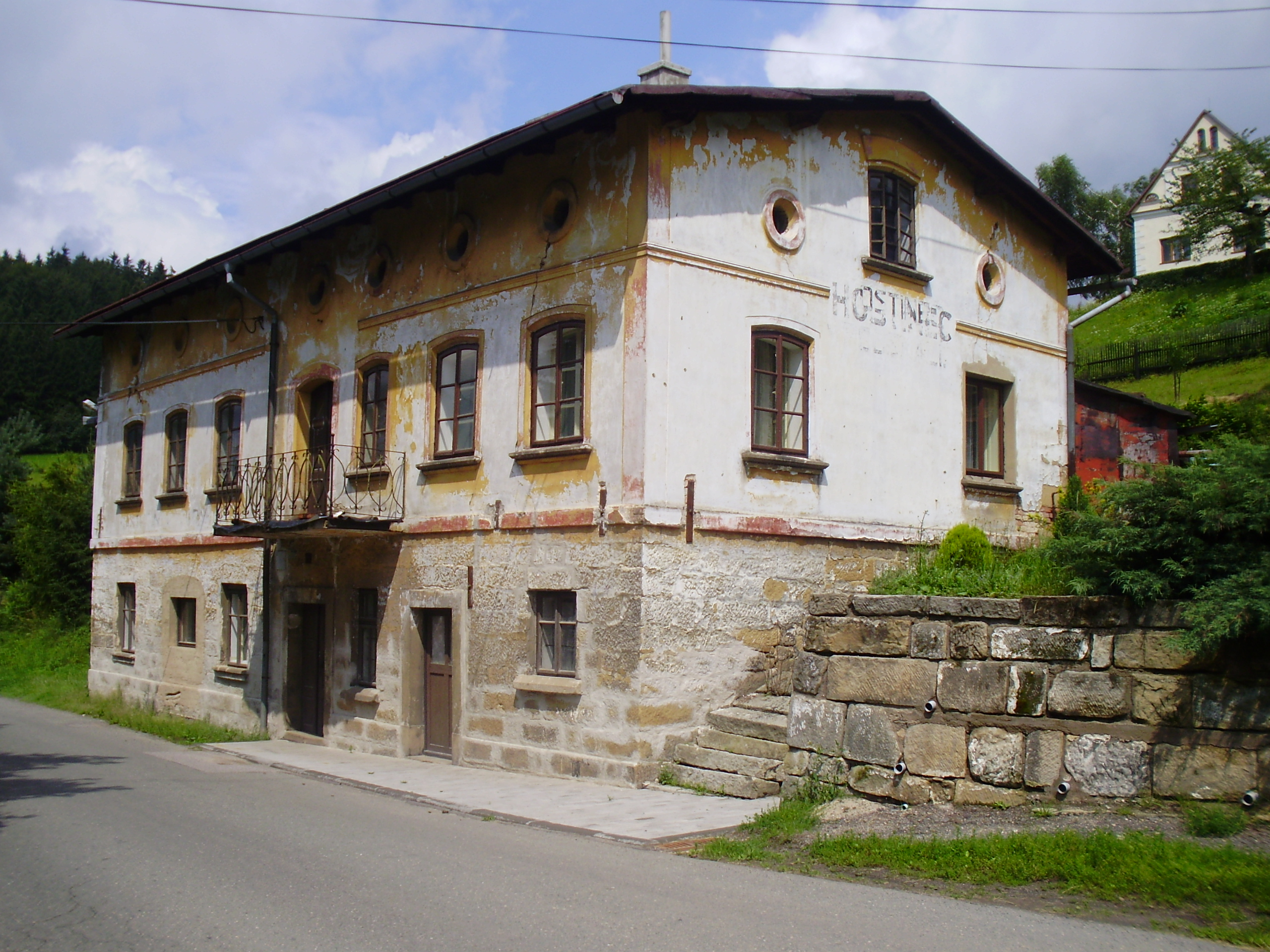 Hlavňov stará hospoda (old pub)